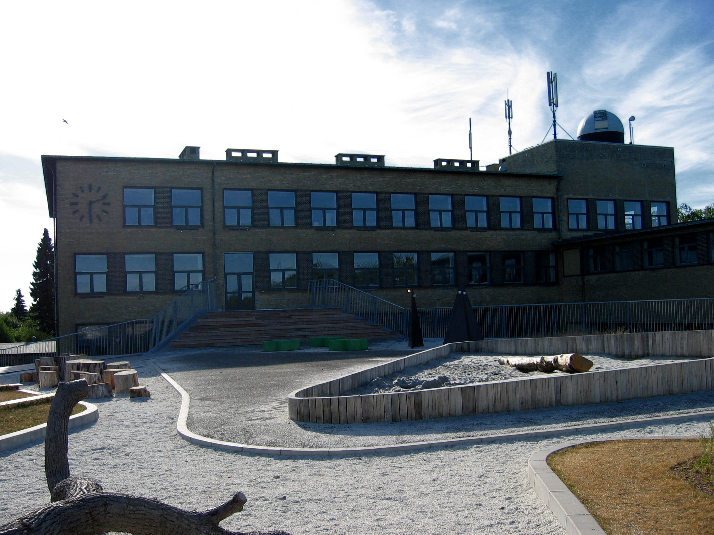 Bakkegårdsskolen from 1935 in Copenhagen, Denmark Tegnet af arkitekt Frederik Wagner. Læs mere her: Bakkegårdsskolen